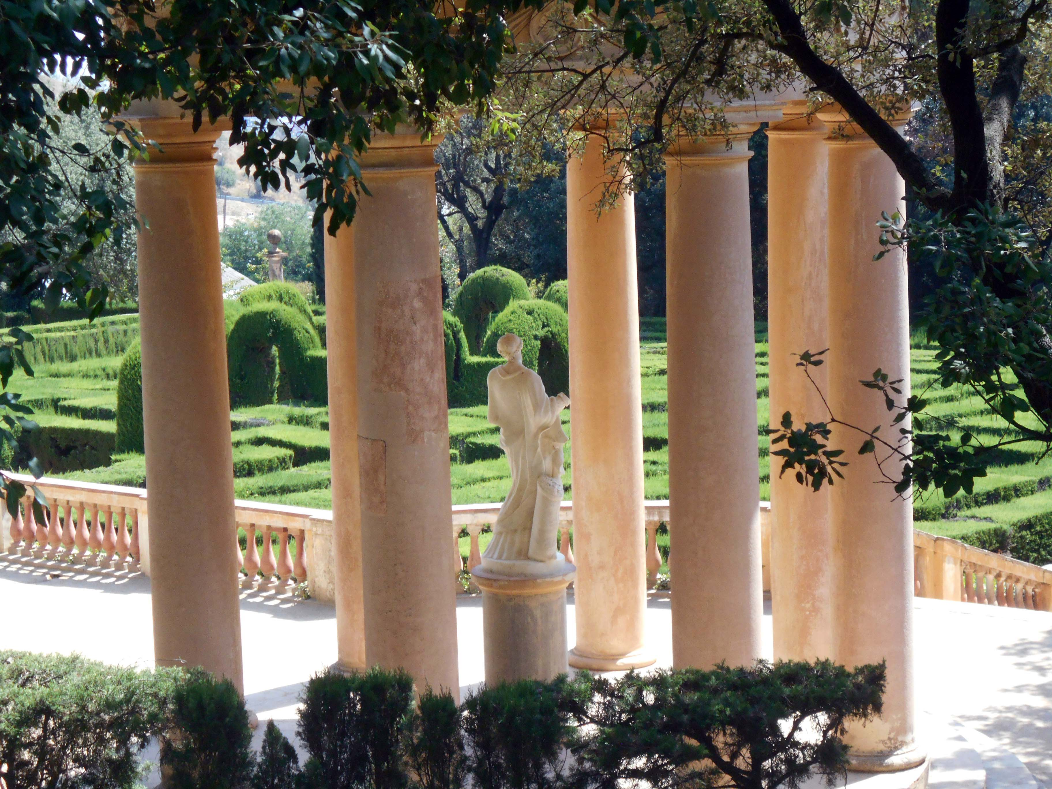 Templete de Dánae con el laberinto al fondo.